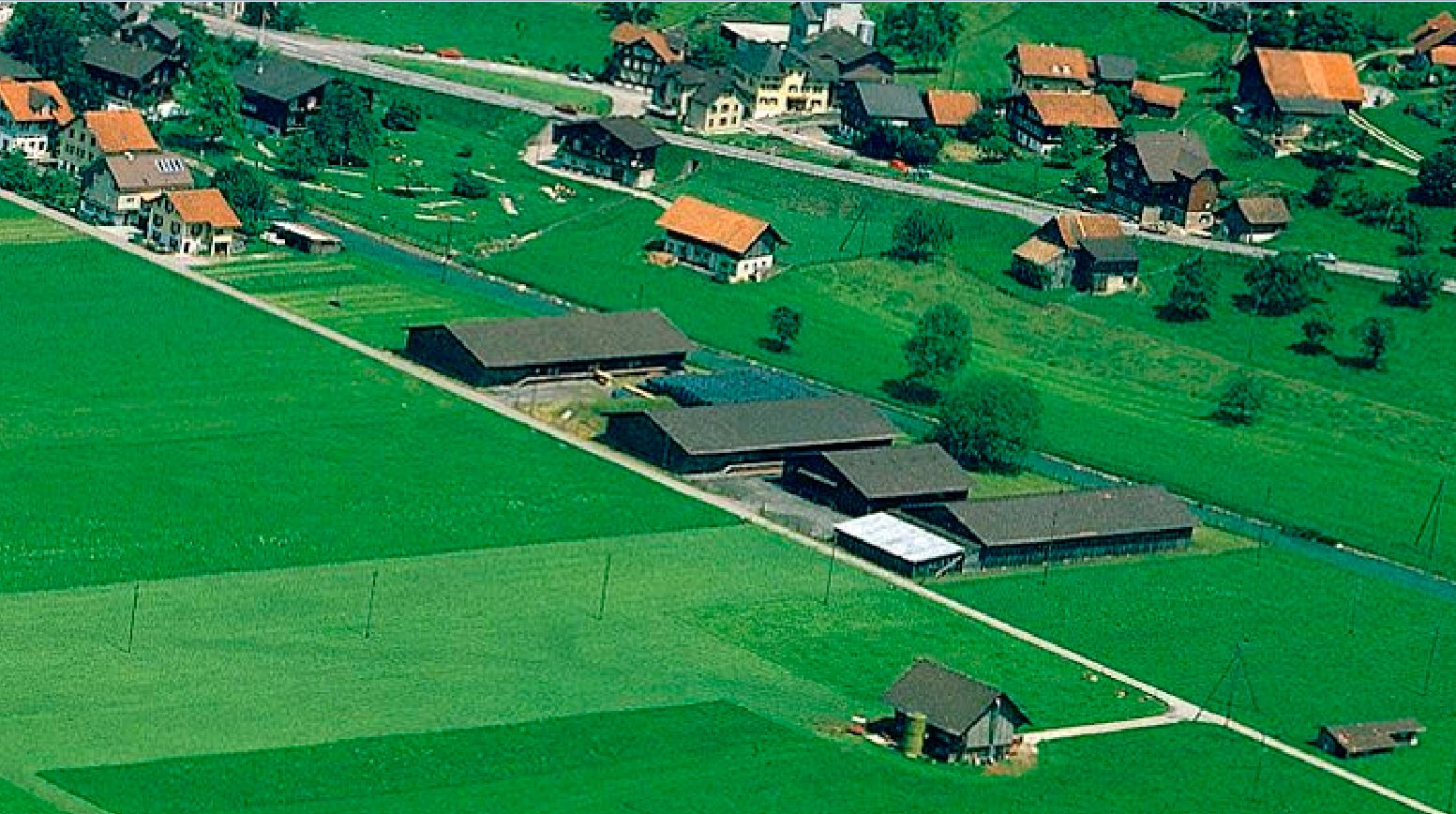 ehemaliges Eidgenössisches Zeughaus, Giswil OW, Schweiz: 1980